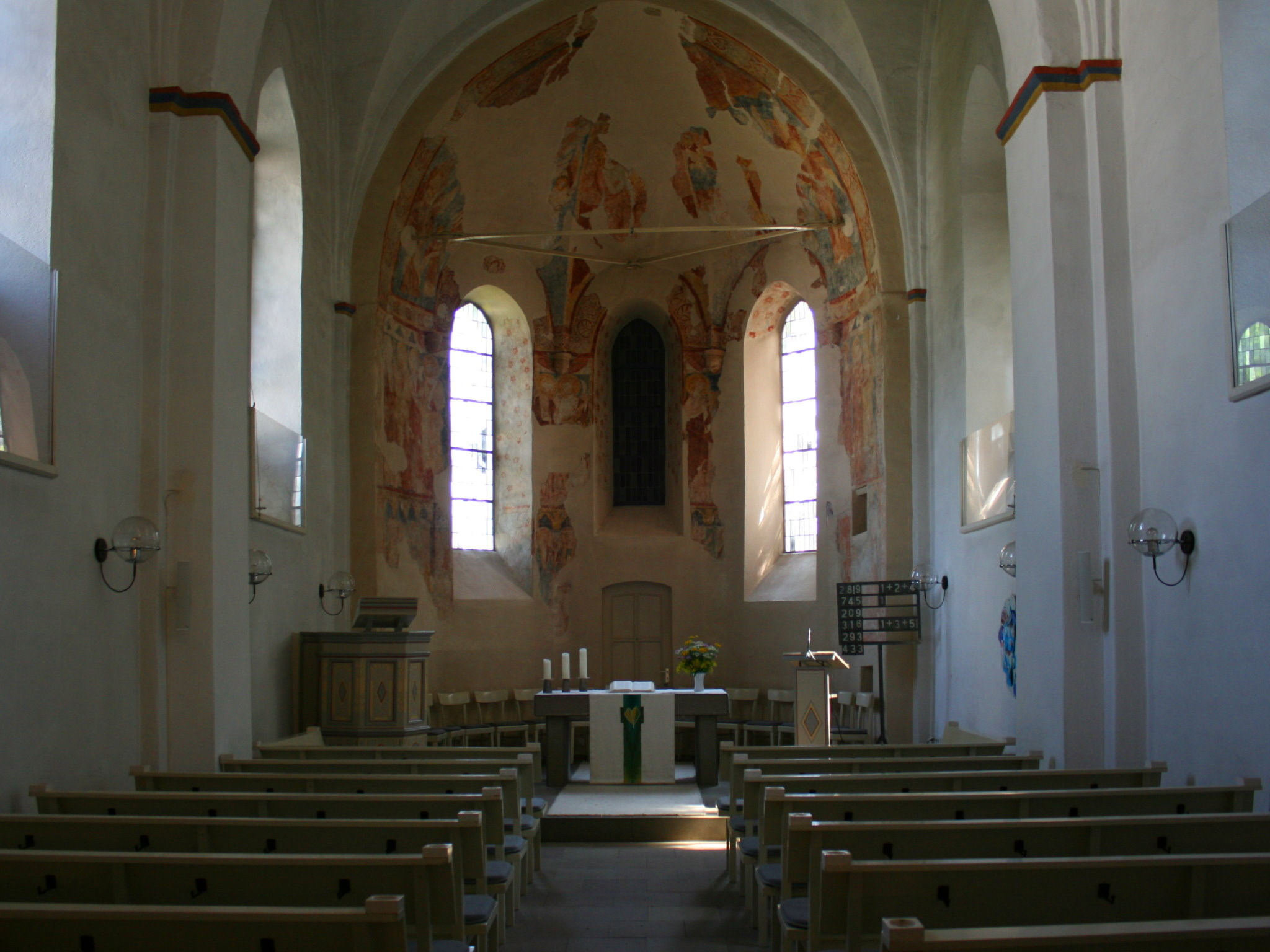 Evangelische Kirche Marienhagen in Wiehl-Marienhagen